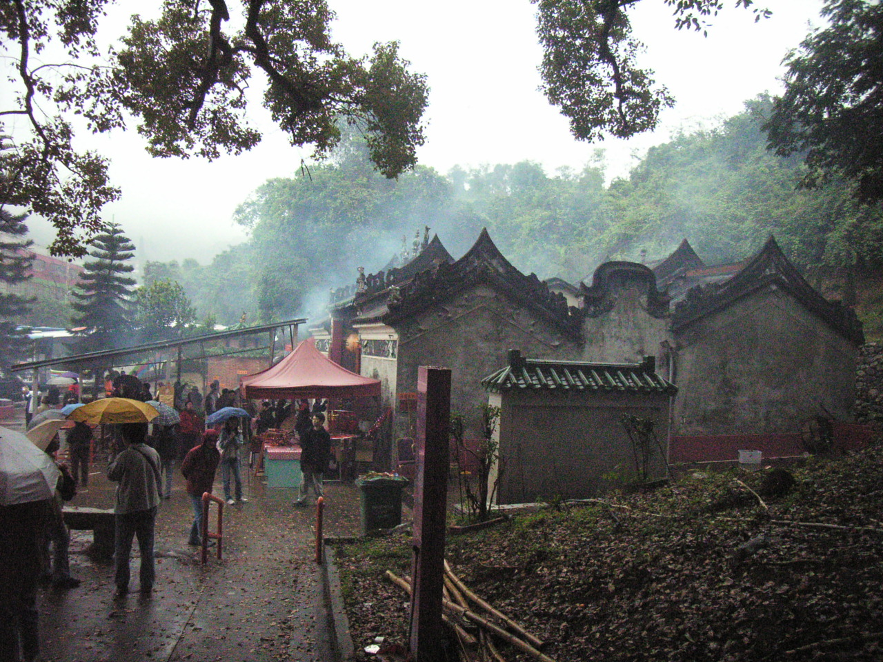 蠔涌車公廟 又名 車公古廟，是一座zh:中國特色的古舊zh:廟宇，此zh:車公廟有300多年歷史。 蠔涌車公廟位於zh:香港zh:西貢區zh:蠔涌，蠔涌河及zh:蠔涌路以北，蠔涌新村以東，亞洲電視zh:建築物以東。 蠔涌車公廟主要供奉之zh:神仙是zh:車公，它是zh:宋朝的大將軍，曾經平定zh:華南某場zh:戰爭zh:叛亂，道教人士奉之為神靈。